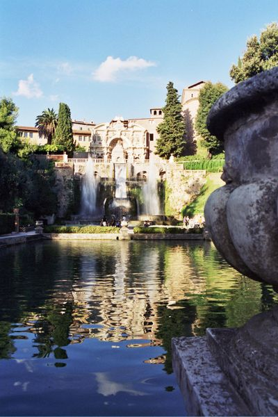 תמונה שצילמתי בhe:וילה ד'אסטה שבhe:טיבולי בקיץ he:2003. אסף.צ 18:04, 30 ינו' 2005 (UTC)